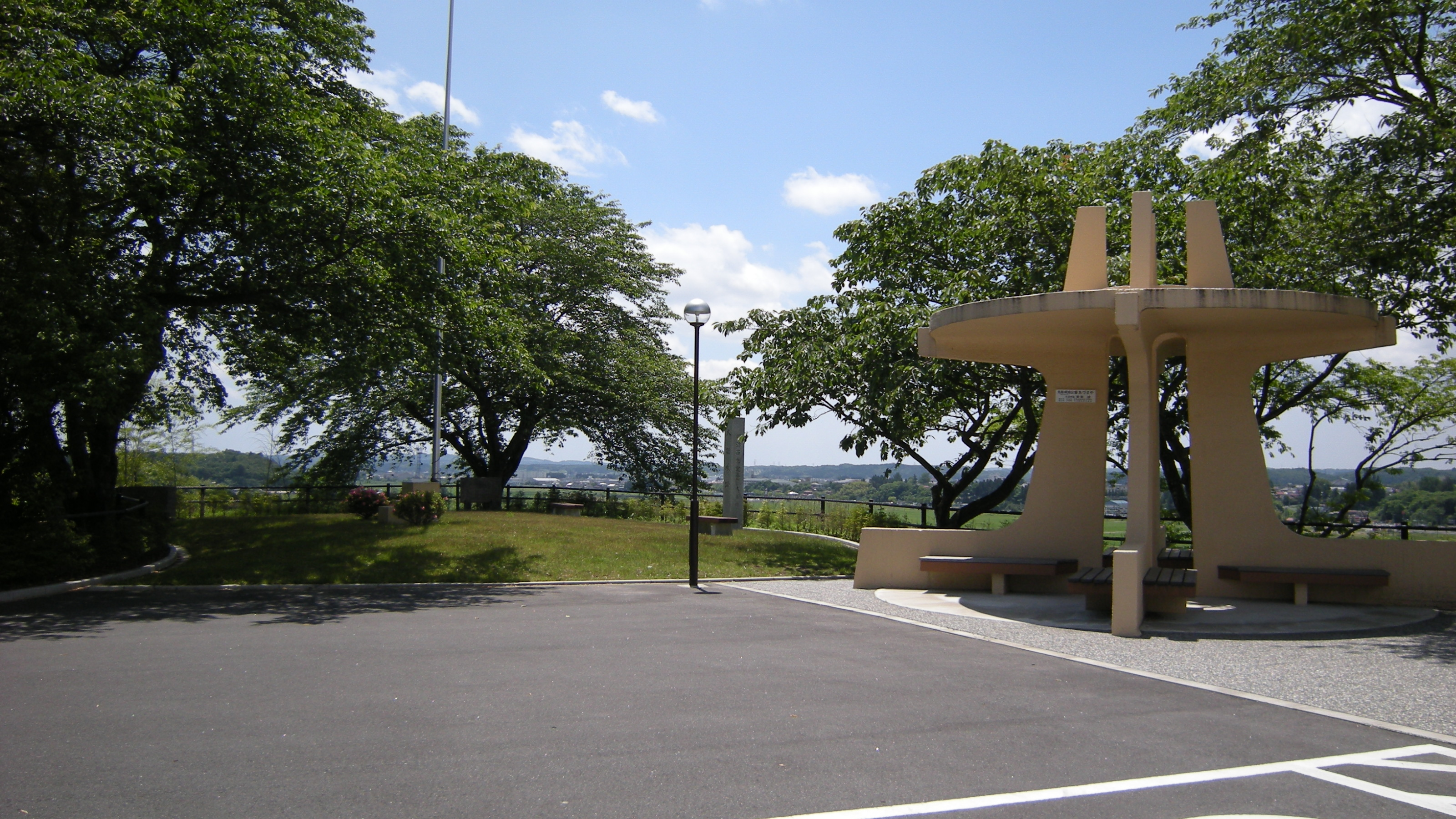 宮城県黒川郡大衡村の大衡城跡公園。展望台となっている南端の部分を、園内の民族資料館から南東に向いて撮影。 中央左寄り奥の樹木の根元に石碑が設置されている。右端の建造物は東屋。